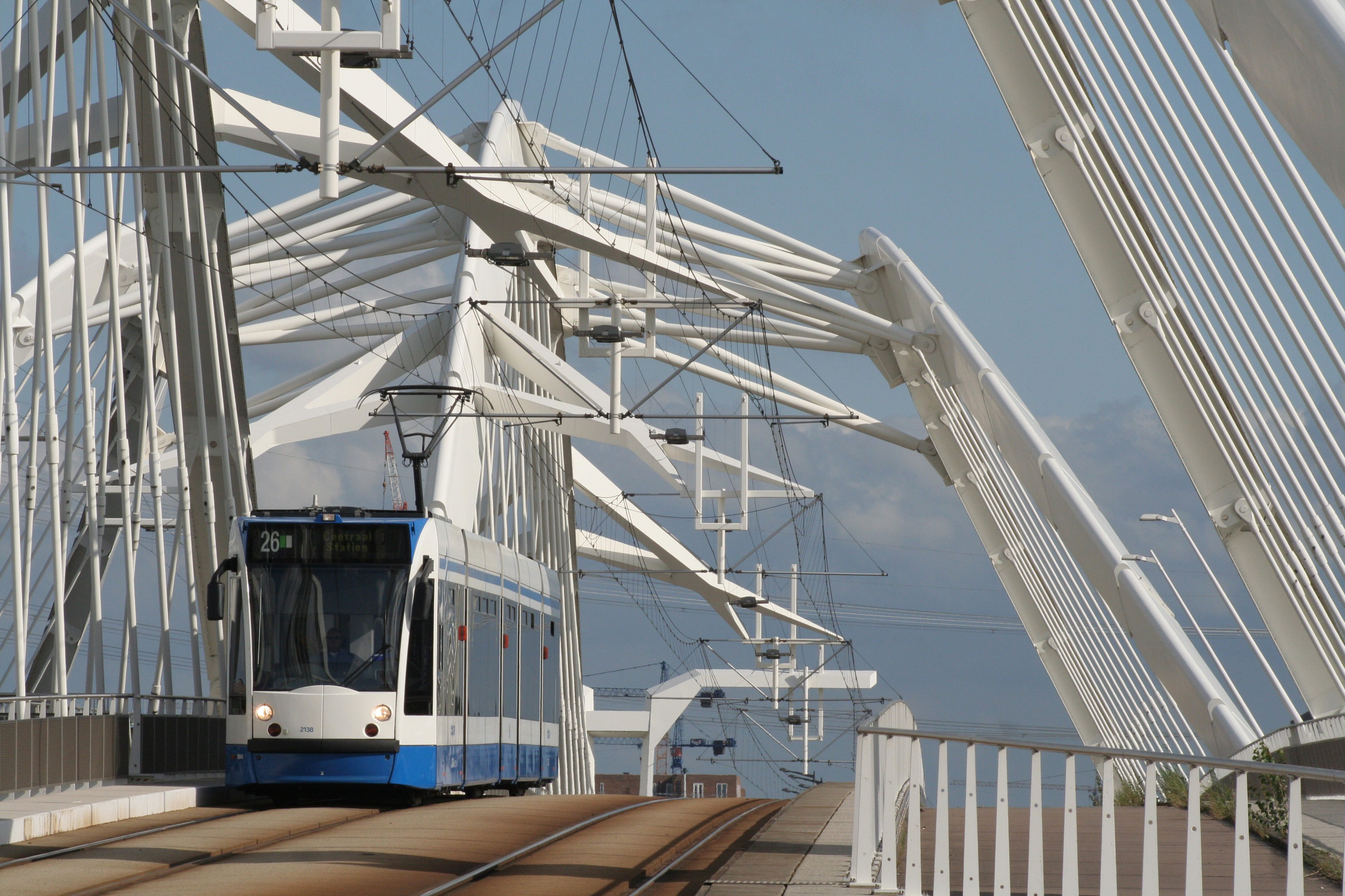 GVB Combino 2138 op de Enneus Heermabrug in IJburg